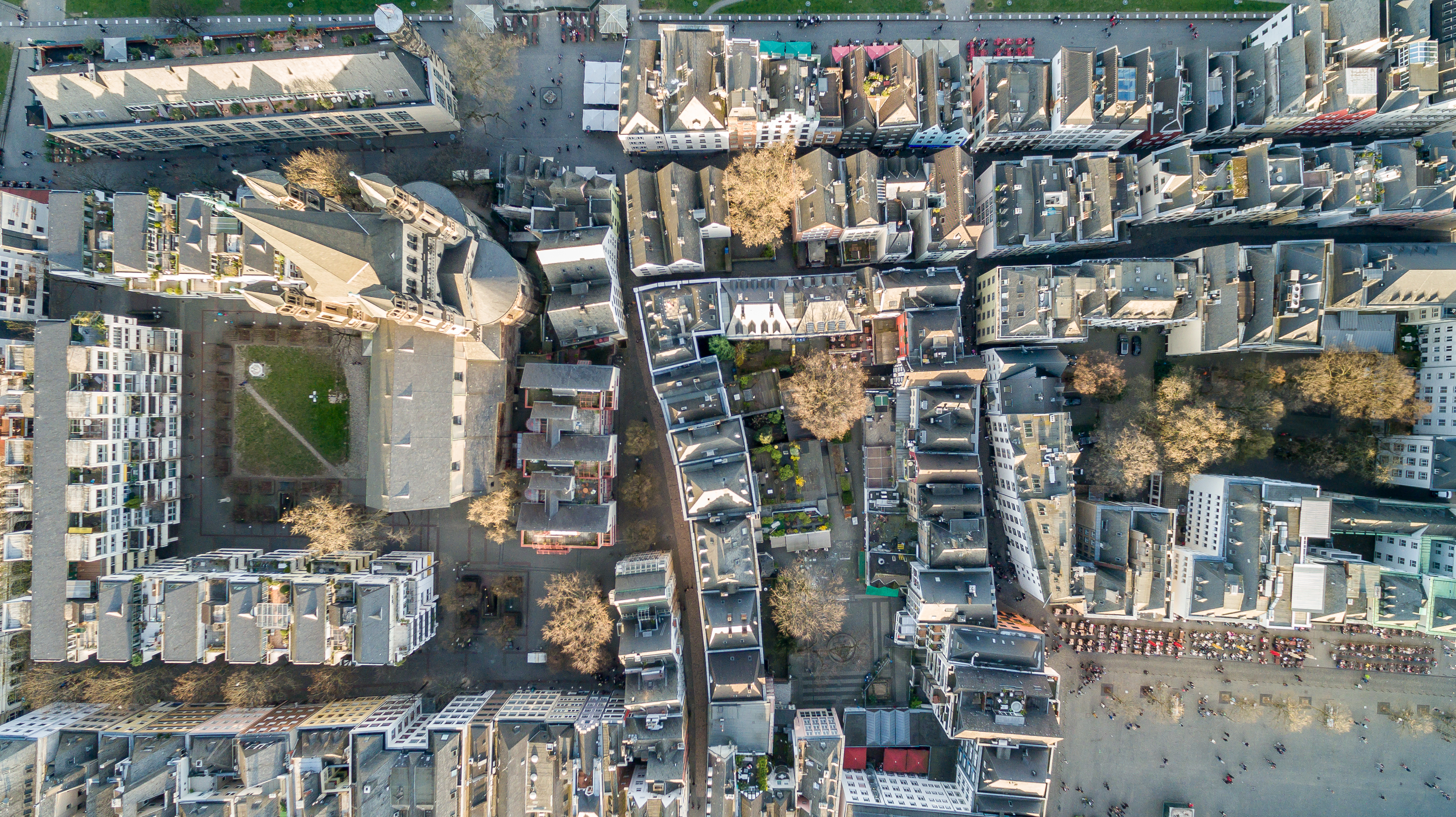 Cologne